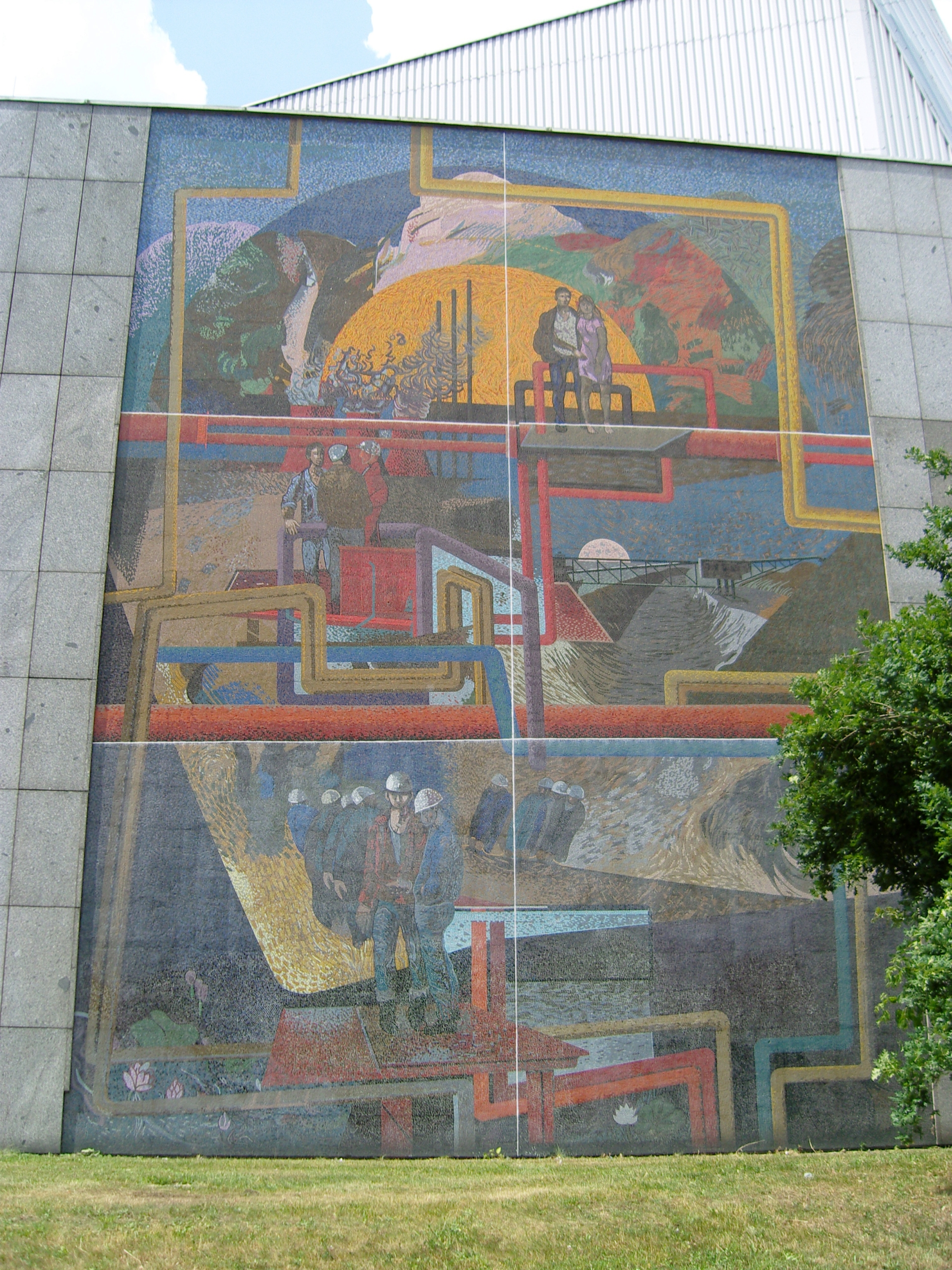 Denkmal Hoyerswerda Wandbild an der Lausitzhalle Hoyerswerda